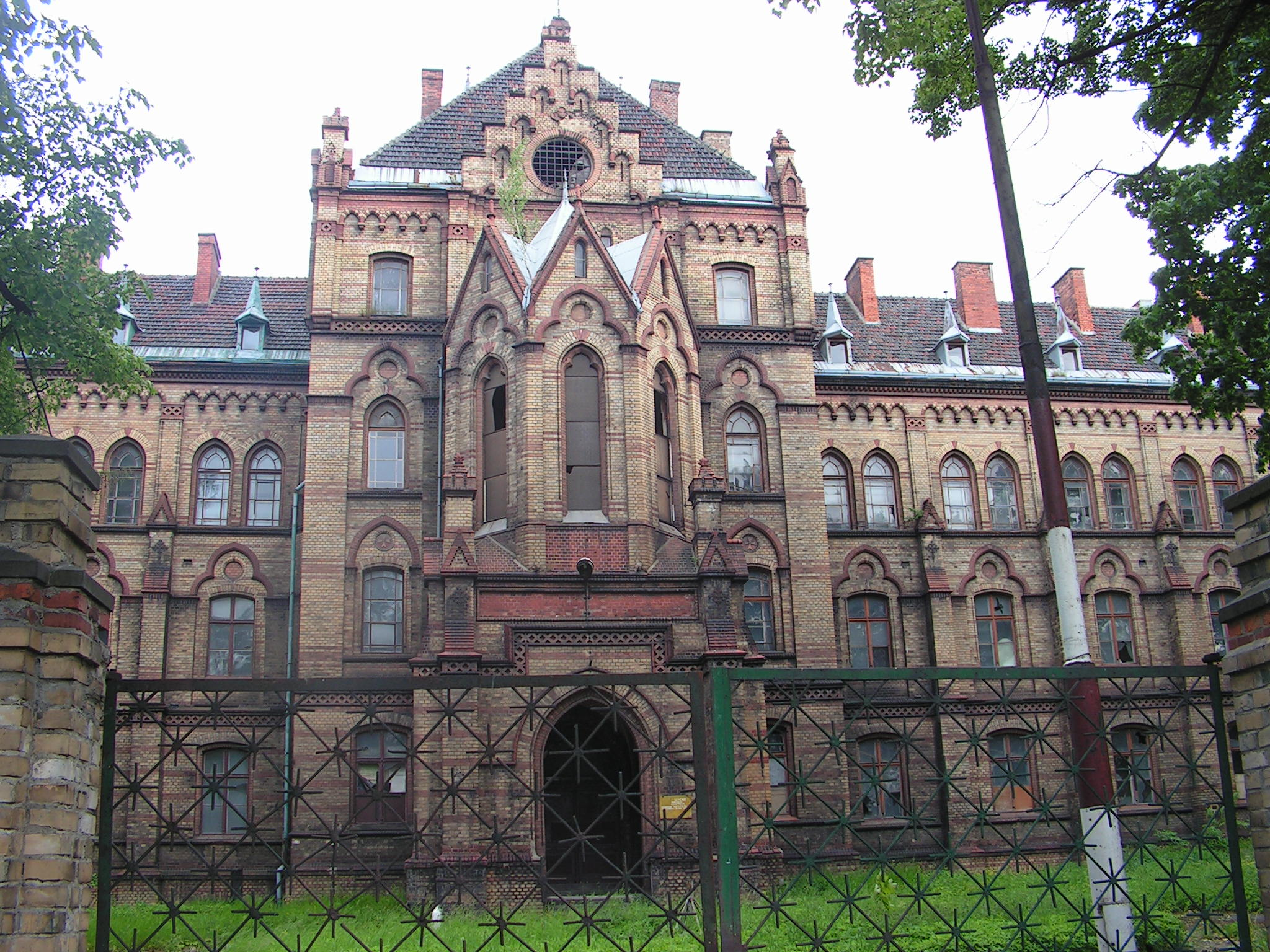 Zamek w Mokrzeszowie